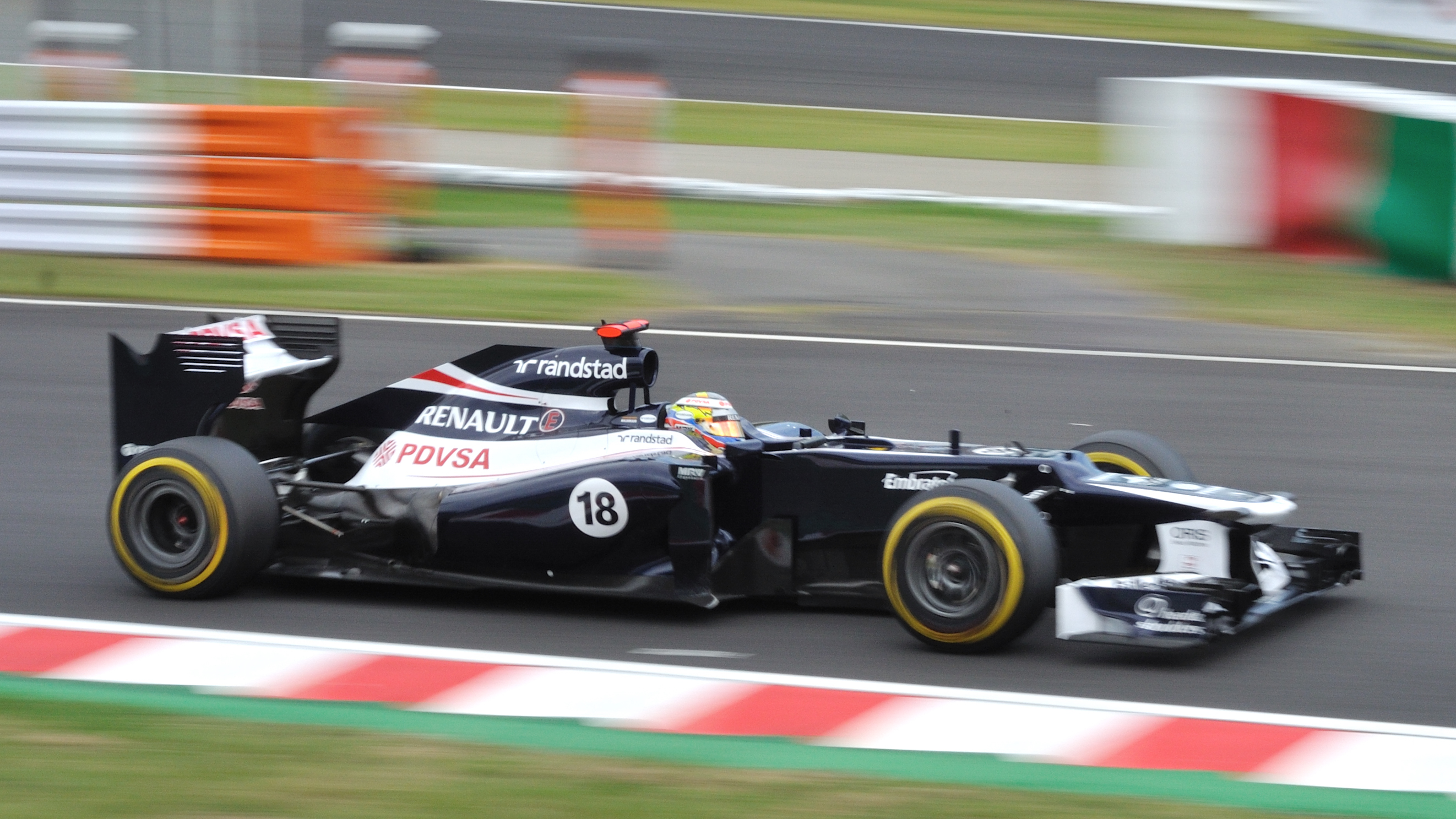 Maldonado Qualifying